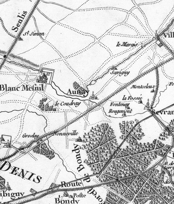 Détail de la carte de Cassini datant de 1750 centré sur Aulnay-sous-Bois (Aulnay à l"époque) afin d'illustrer l'article consacré à cette commune. Carte originale Auteur : Cassini de Thury, César-François (1714-1784) Type : image fixe, monographie Titre(s) : Paris. Nouv. éd. N °1 [Image fixe numérisée] / R. Brunet fecit. Ecrit par Bourgoin Publication : [S.l.] : [s.n.], [s.d.] Imprimeur / Fabricant : [Paris : Observatoire puis Dépôt de la Guerre entre 1756 et 1815], [ca 1815] Description matérielle : 1 carte ; 59,5 x 92 cm Collection : [Carte de France / établie sous la direction de César-François Cassini de Thury] ; 001 Note(s) : Cote : Ge CC 707 (7 H) BNF Richelieu Cartes et Plans Reprod. Sc 88/573 Notice n° : FRBNF38639065